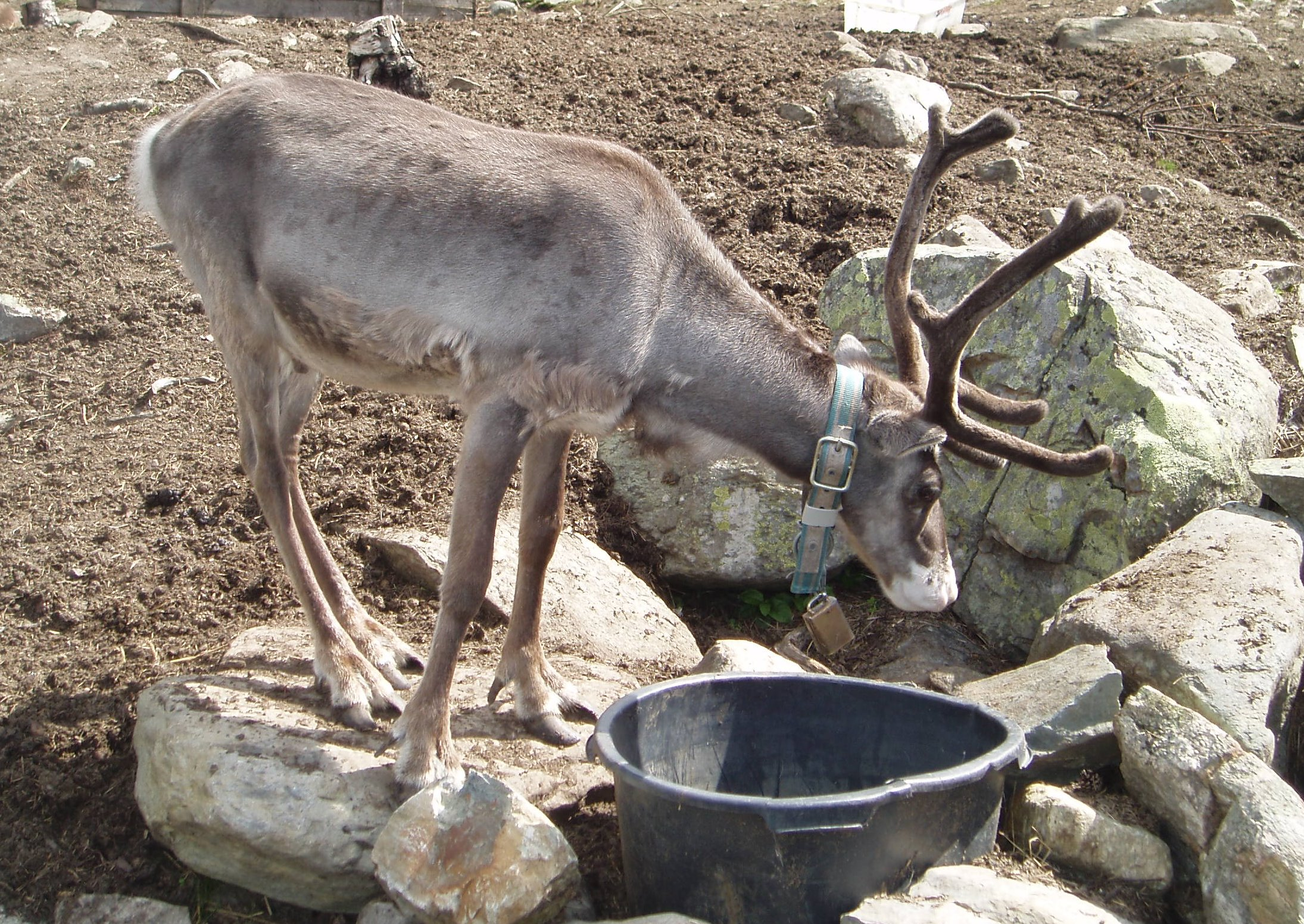 Reinsdyr på Langedrag Naturpark (Reindeer on Langedrag Naturpark in Norway)